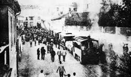 Alessandria - Tram per Sale in piazza Genova